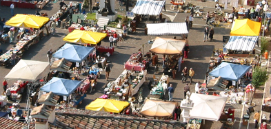 Mercantico